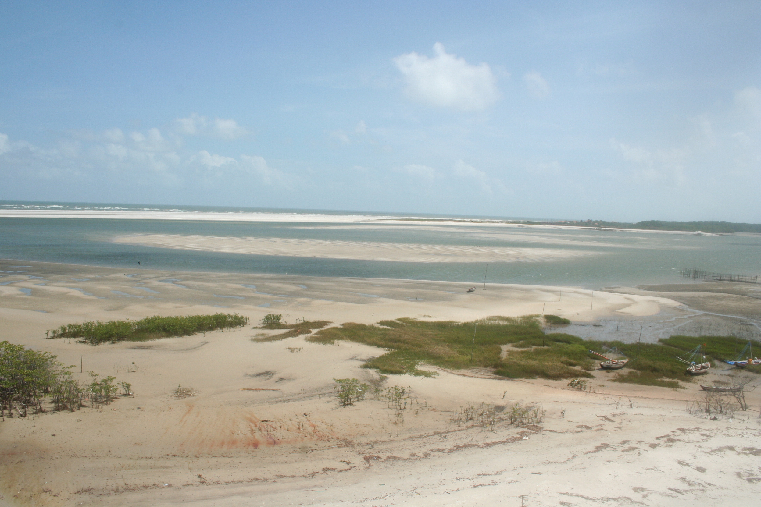 Praia em Salinópolis, Pará, Brasil.